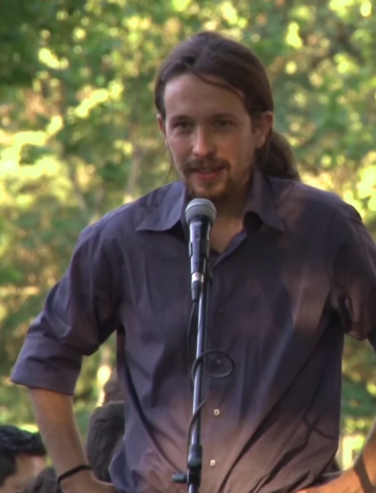 Pablo Iglesias Turrión durante un acto público en Madrid el 14 de junio de 2014.